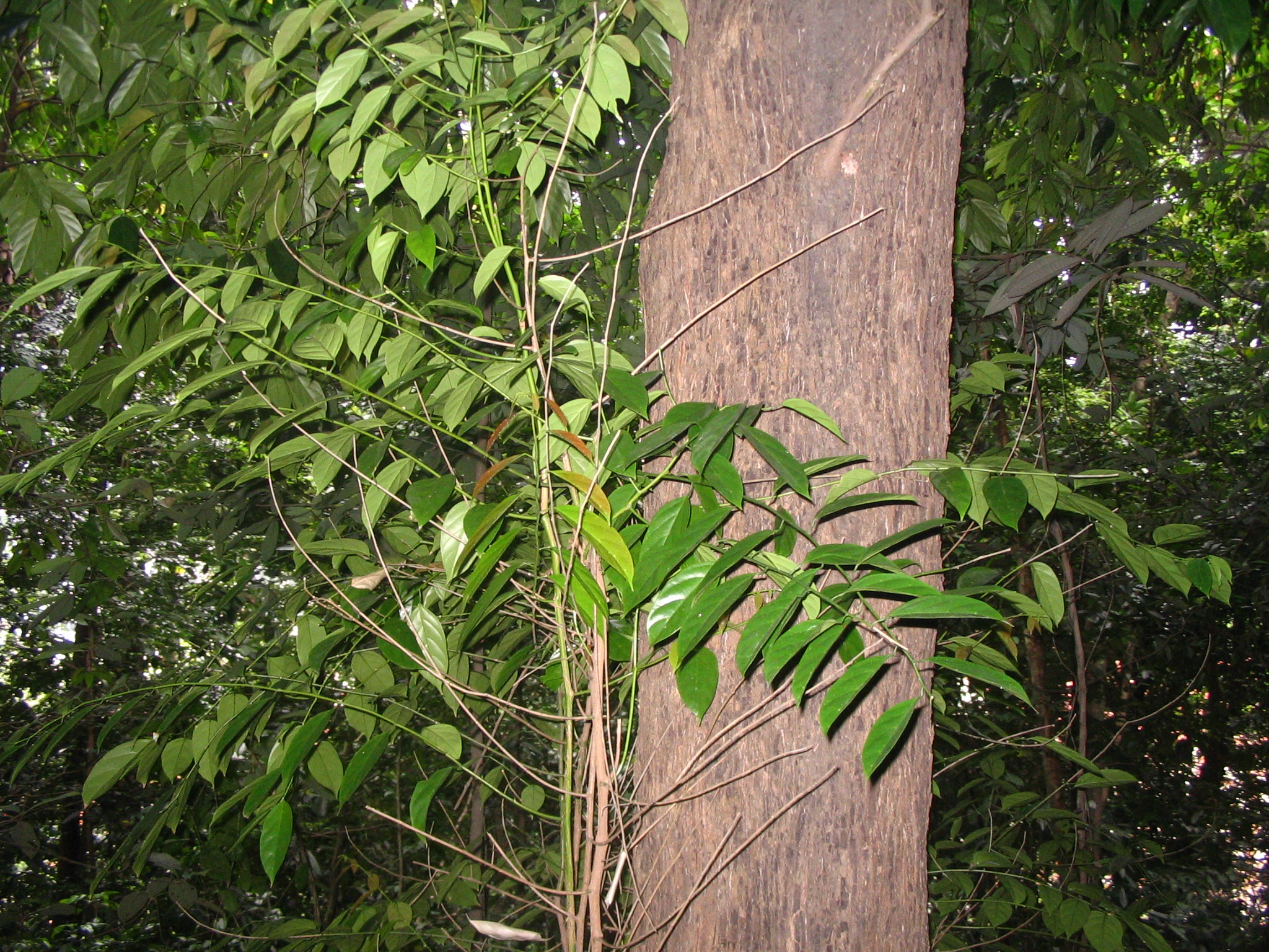 Scorodocarpus borneensis , feuilles esur des pousses à la base du tronc - Bukit Nanas Forest Reserve - Kuala Lumpur